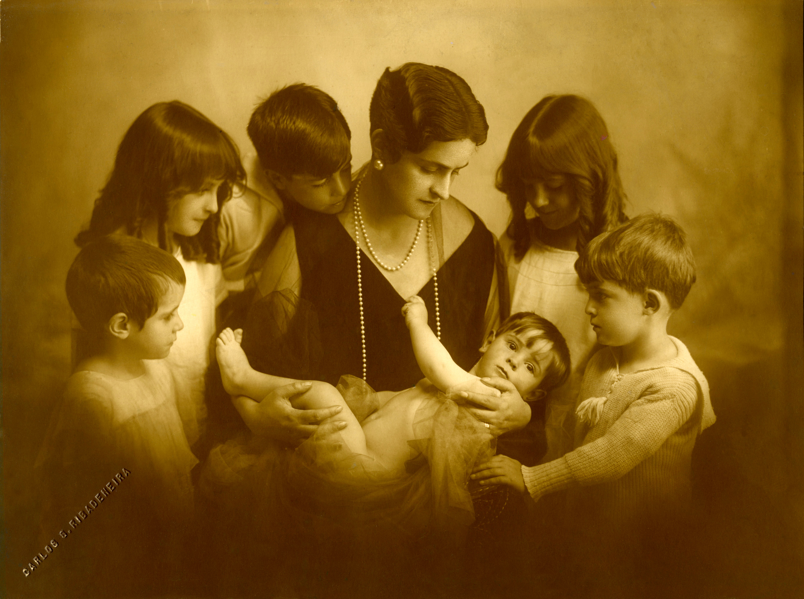 Retrato de Hipatia Cárdenas de Bustamante, escritora ecuatoriana. Con esta fotografía Carlos Rivadeneira obtuvo el premio en Roma